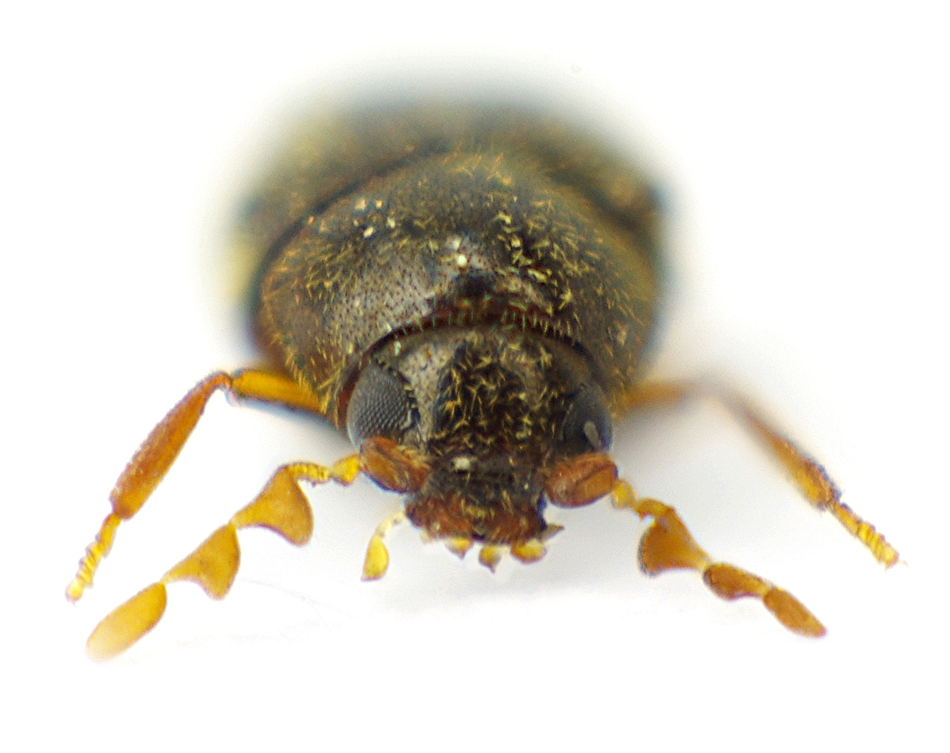 Dorcatoma substriata von Süddeutschland, zwischen Tuttlingen und Rottweil, 700 m hoch, an Baumschwamm an Pflaume Anfang Juni 2014, Vorderseite